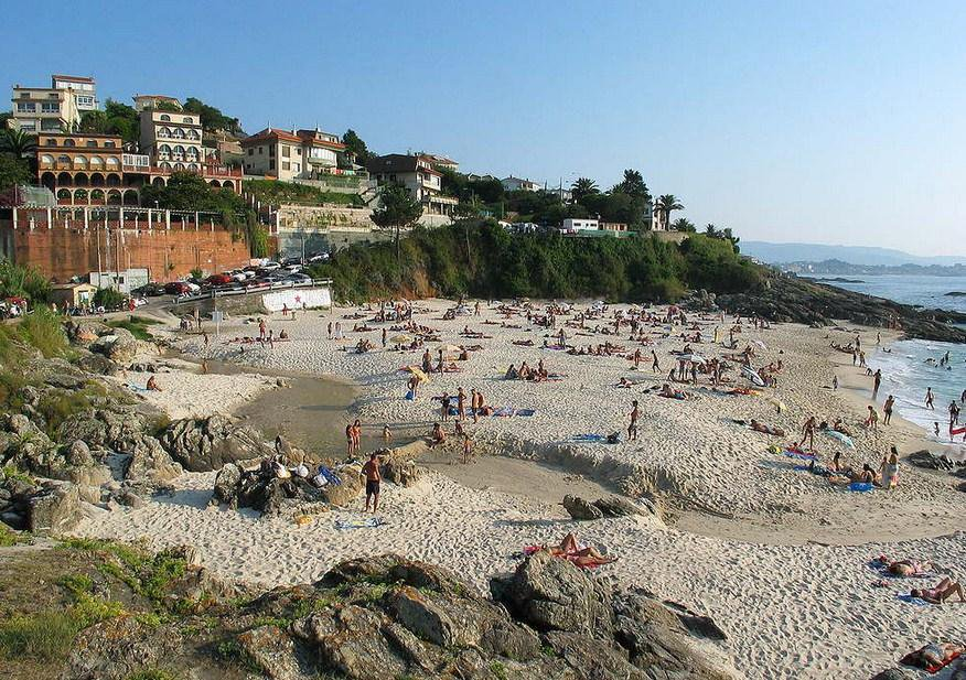 Playa Muíños de Fortiñón en Vigo.